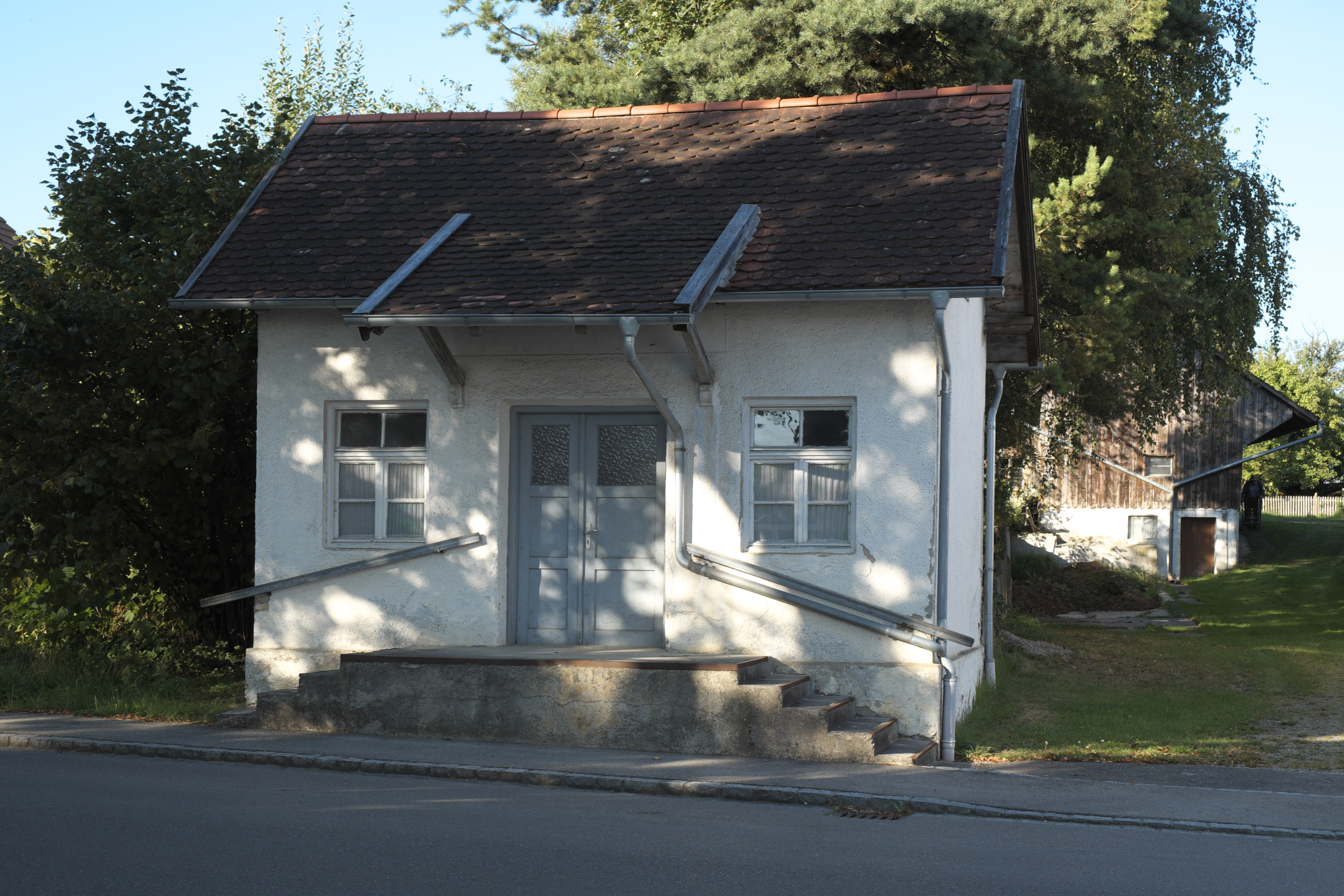 Milchsammelstelle in Dünzelbach (Moorenweis) im Landkreis Fürstenfeldbruck (Bayern/Deutschland)